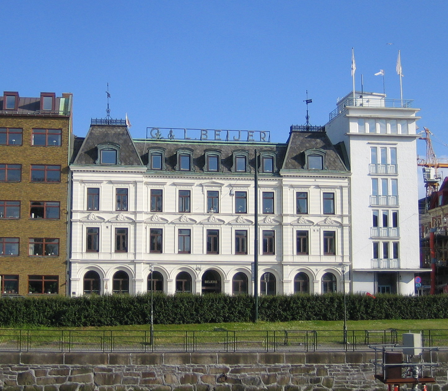 G&L Beijers hus i Malmö, Skåne